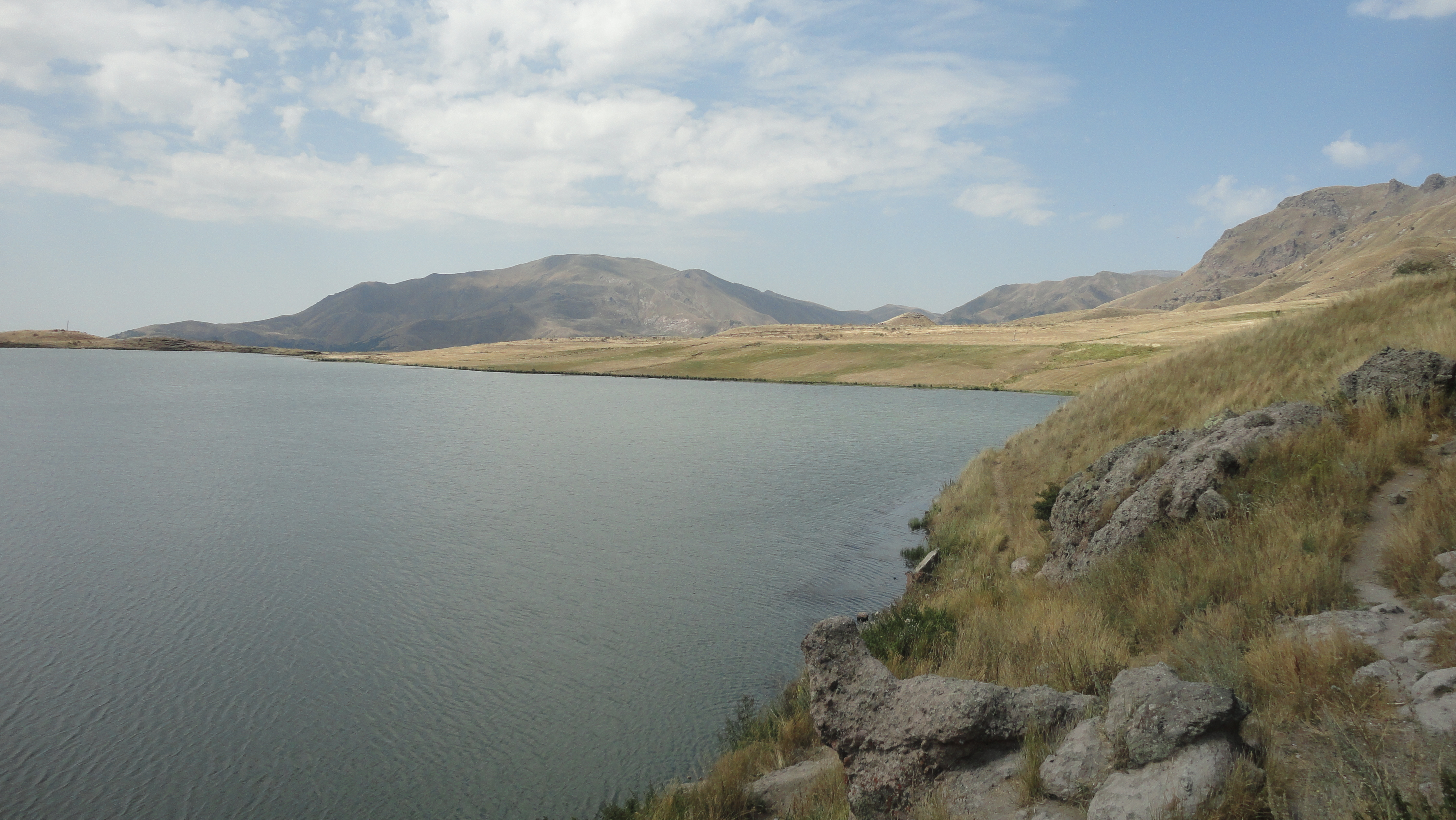 Batabat gölü